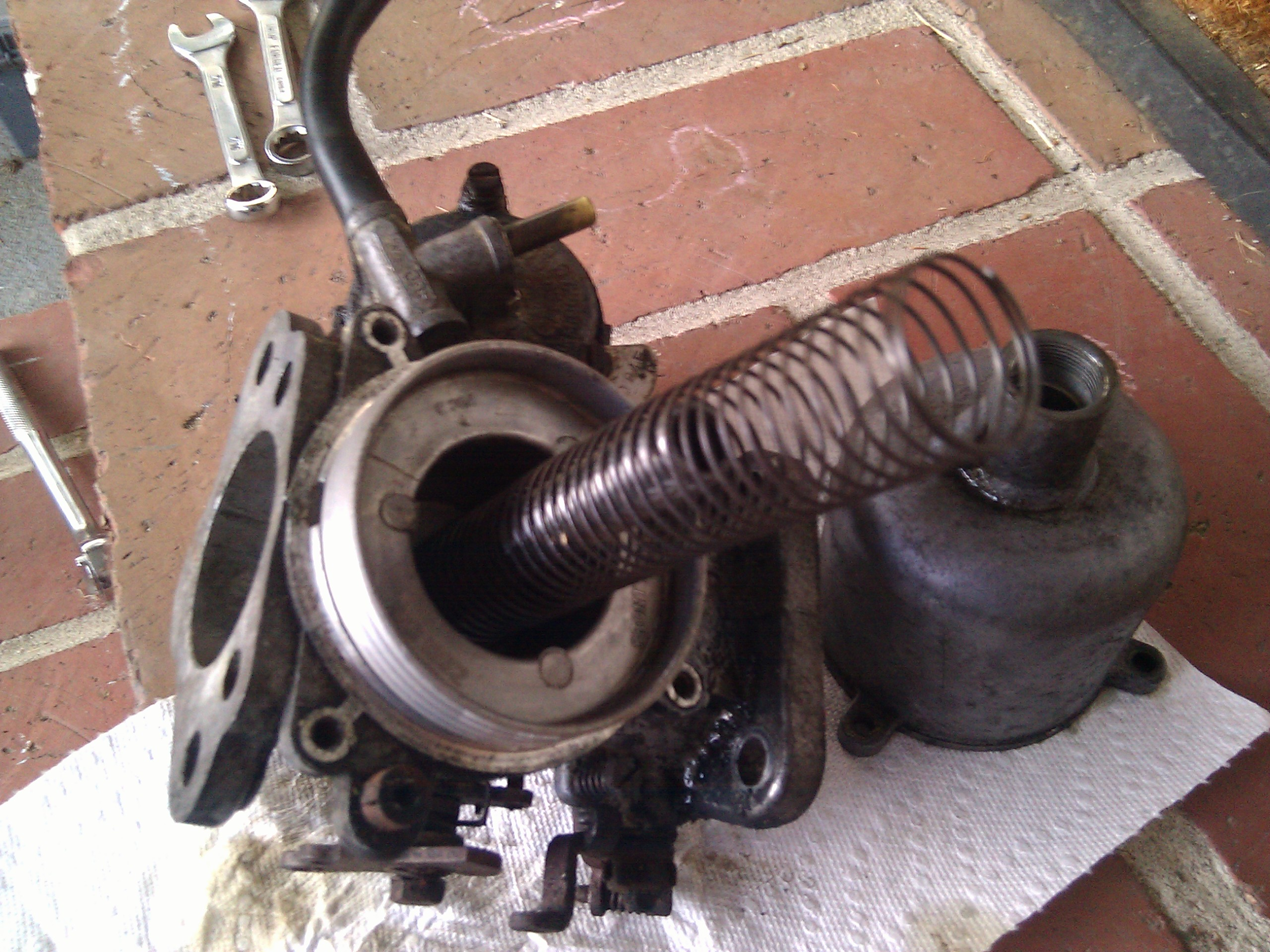 Disassembling front SU HS6 carburetor S. U. 122 carburettor HS6 Volvo Amazon 1966